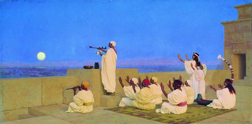 Степан Бакалович. Моление Кхонсу